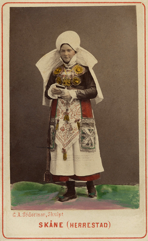 Dräktdocka med huvud skulpterat av C A Söderman, visa på världsutställningen i Paris 1867. Kvinna i dräkt från Herrestad, Skåne.Kolorerad.